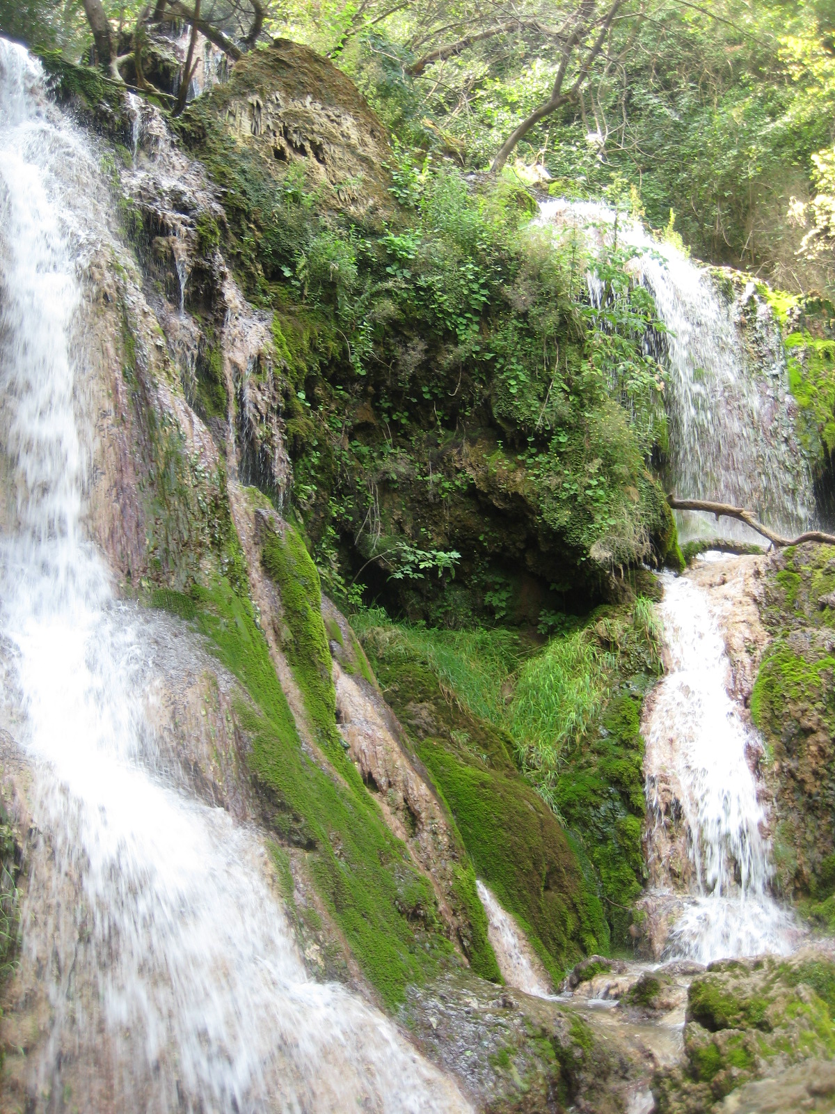 Крушунска бигорна каскада